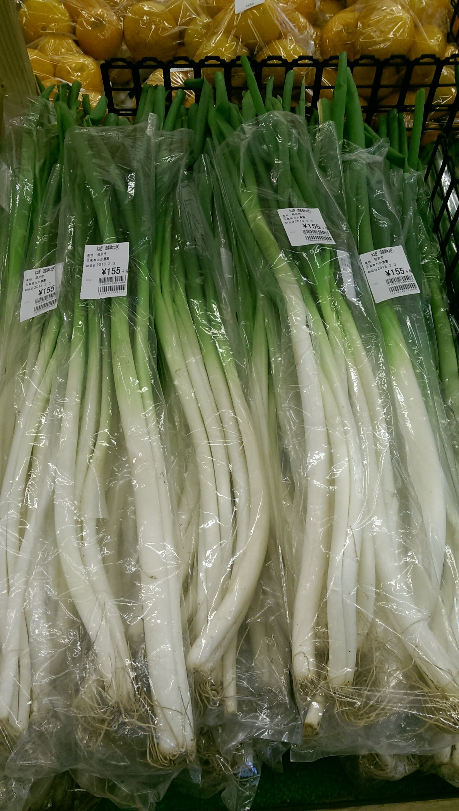 愛知県の伝統品種「越津ねぎ」